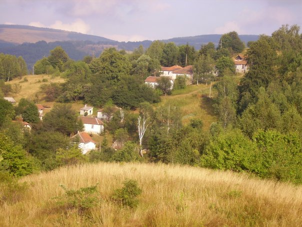 Naselje Čuka (Crna Trava)